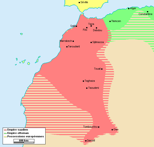 Extension maximale du Maroc sous la dynastie saadienne, fin XVIe / début XVIIe siècle.